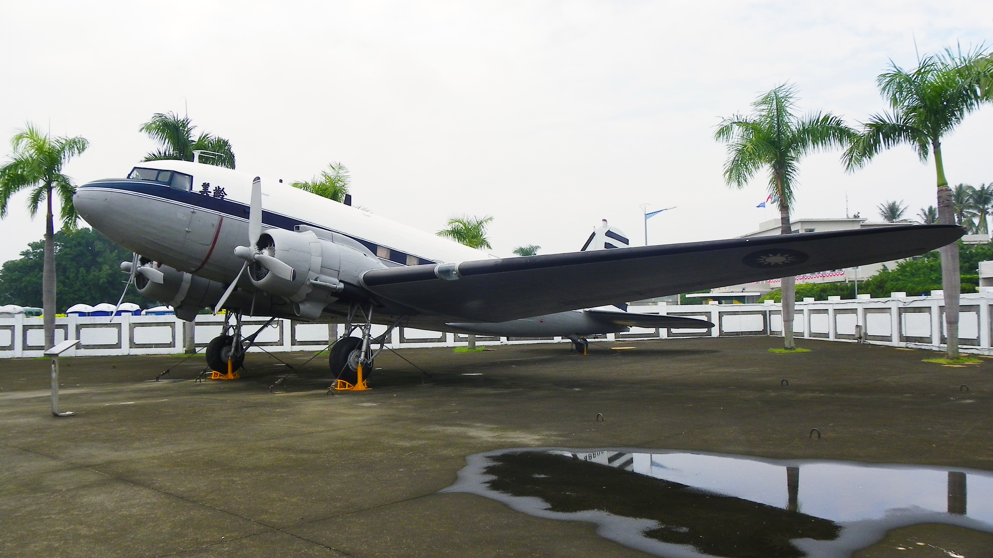 岡山空軍官校軍機展示場的美齡號，現行塗裝為2010年重塗。